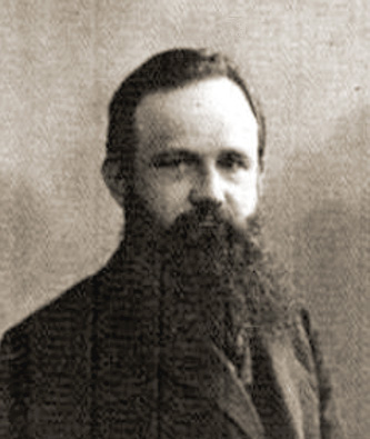 Jan Brejski (1864-1934) war ein polnischer Verleger, Politiker und Gewerkschafter im Deutschen Kaiserreich und seit 1918 Politiker und Verleger in Polen